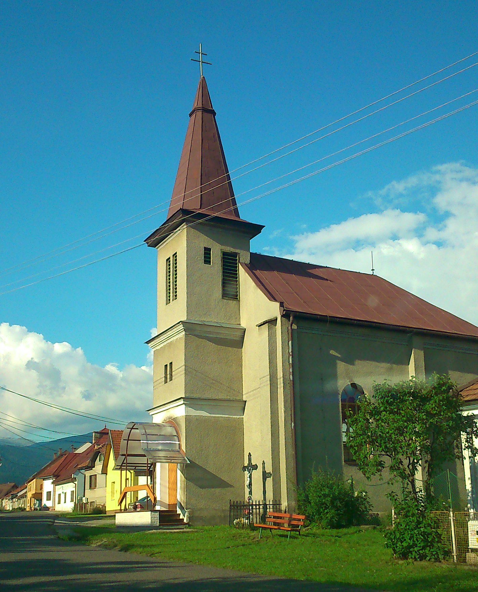 Centrum obce s kostolom